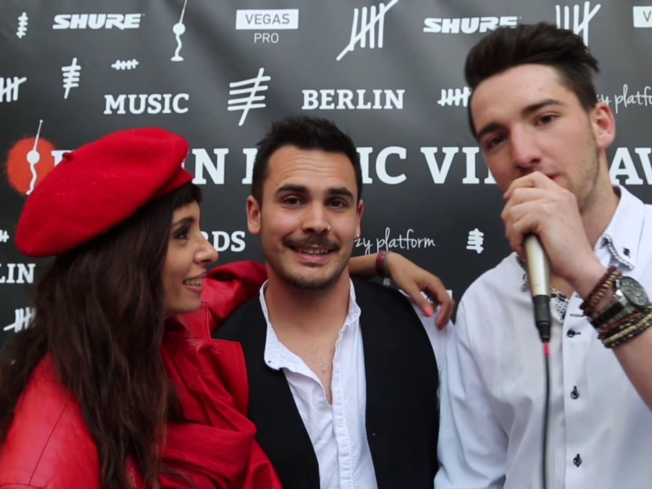 Marko Montana (en el centro de la imagen) en Berlin Music video awards 2017 junto a una periodista y Sebastian Rodriguez.